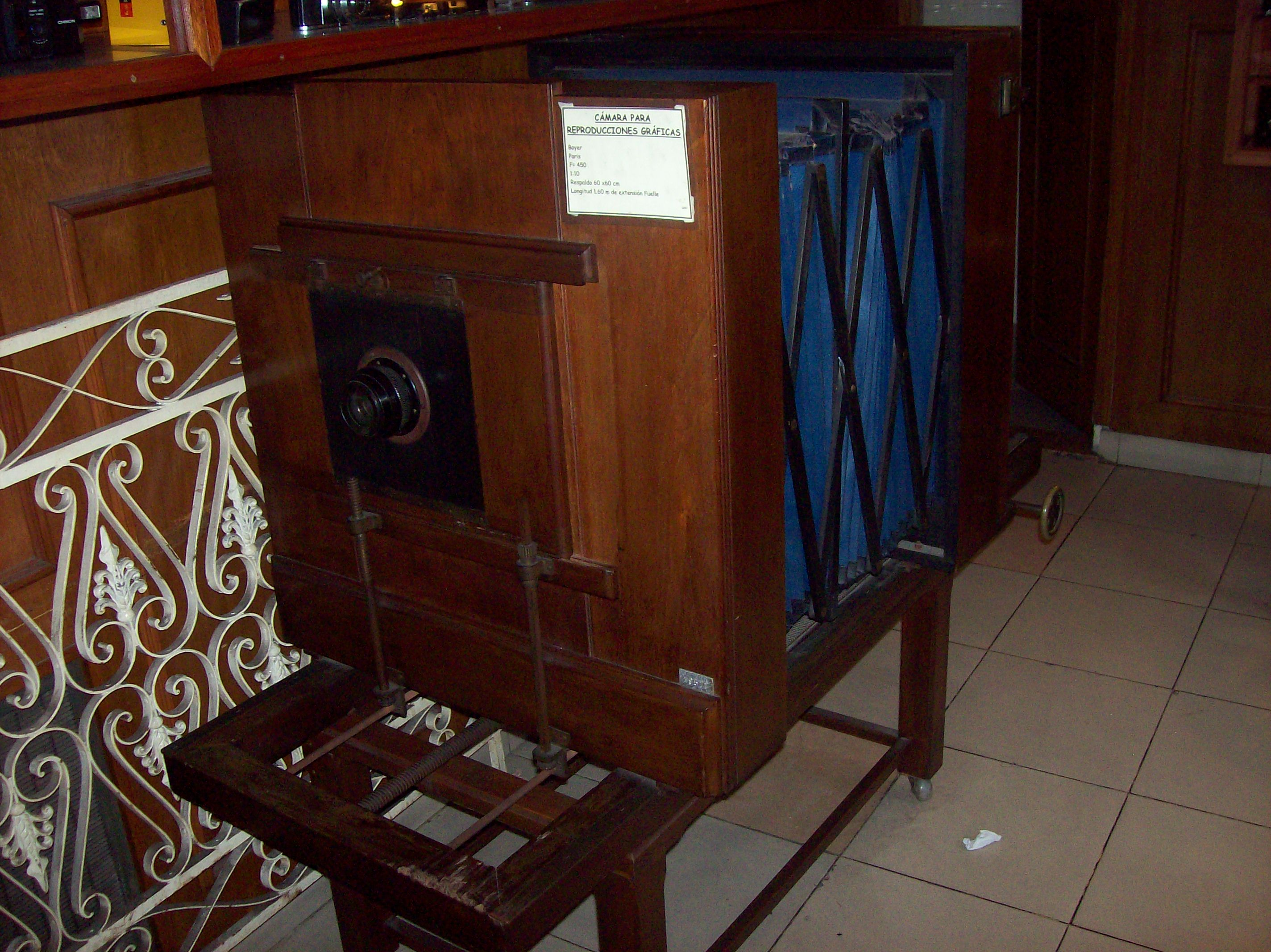 Museo Fotográfico Simik, en Chacarita, Buenos Aires, Argentina. (Cámara con 1,60 m de fuelle)